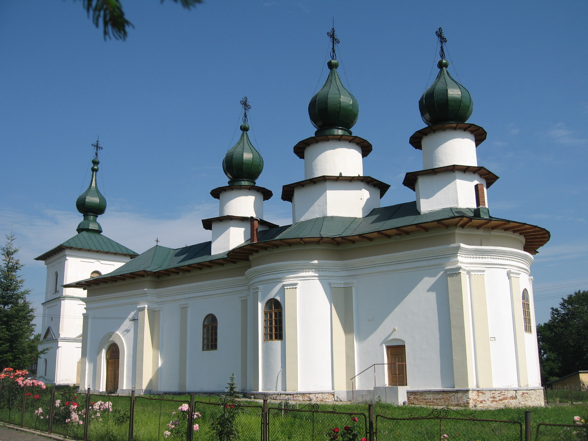 Mănăstirea Agafton